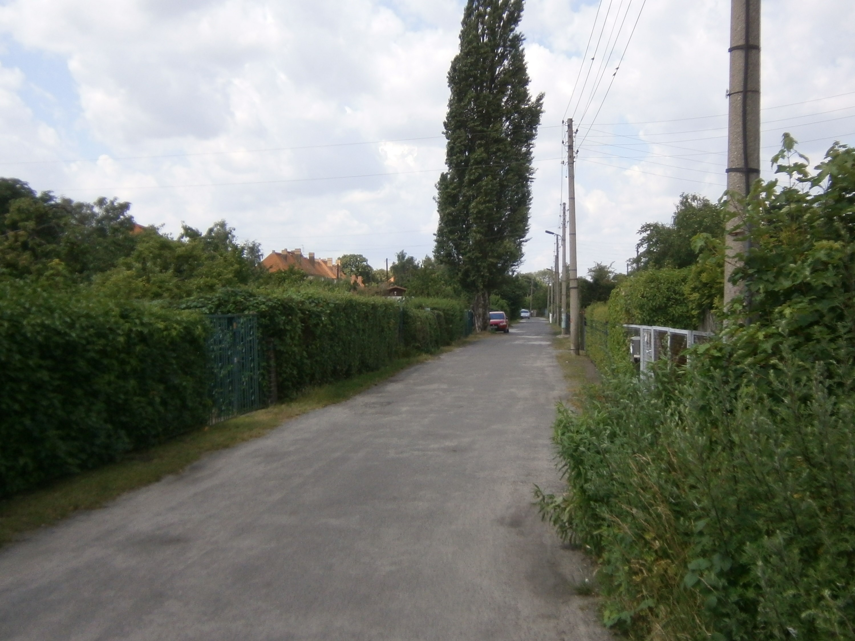 Der Schwarze Weg ist eine amtlich nicht gewidmete Privatstraße in Berlin-Johannisthal. Hier der Blick vom südlichen Bahnhofsvorplatz Schöneweide nach West.